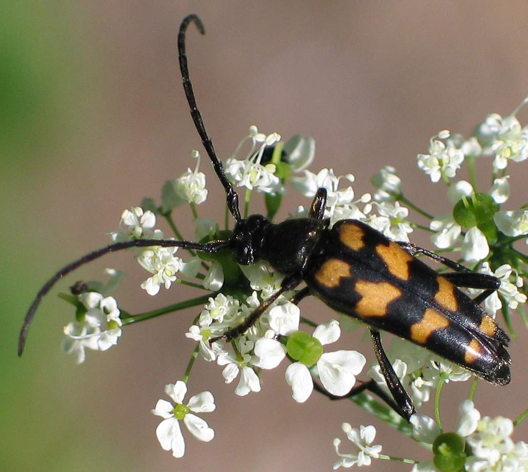 Strangalia quadrifasciata (Linnaeus, 1758), Špindlerův Mlýn, Czech Republic